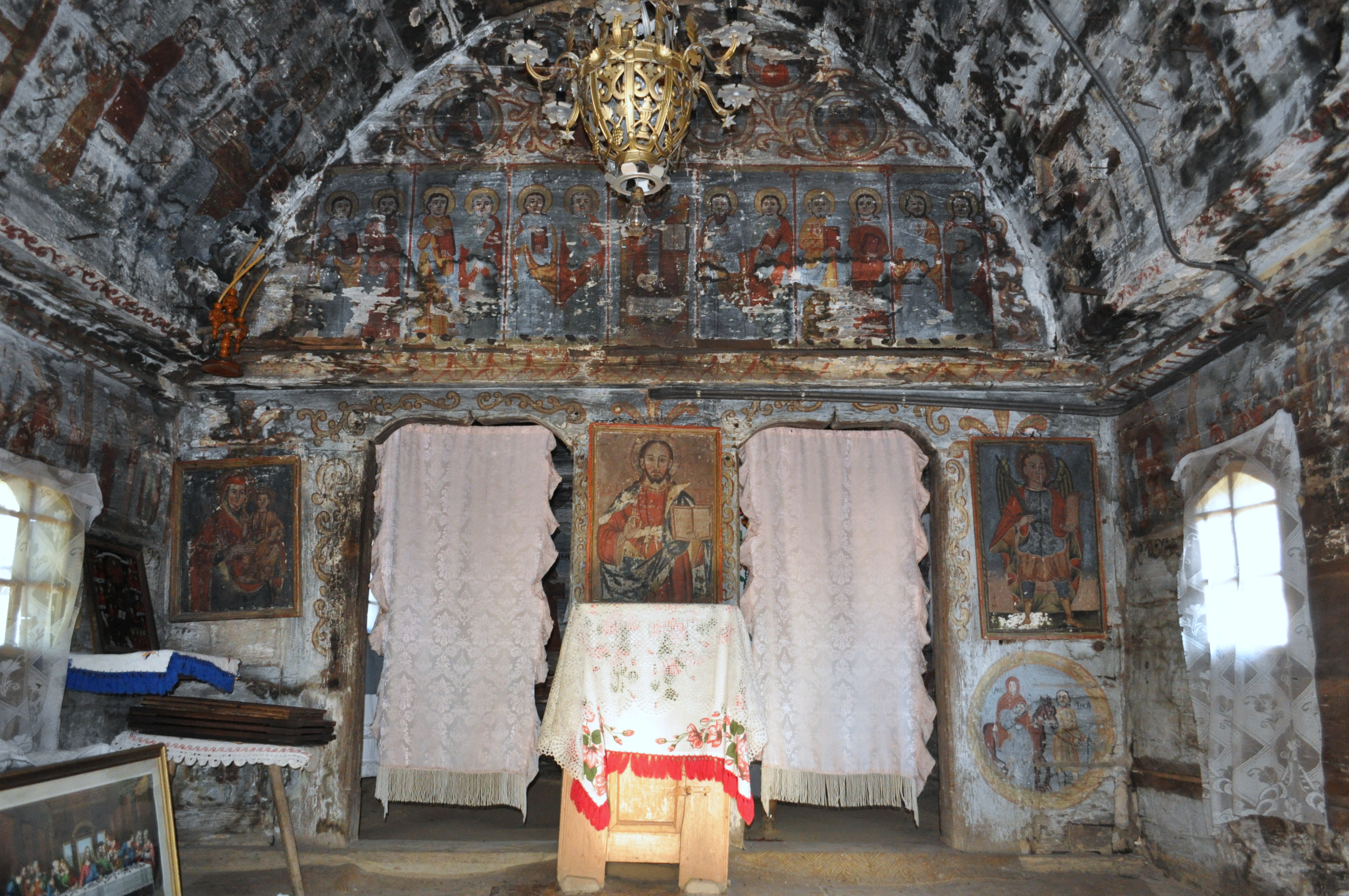 Biserica de lemn "Cuvioasa Paraschiva" , sat STEJERA; comuna MIREŞU MARE